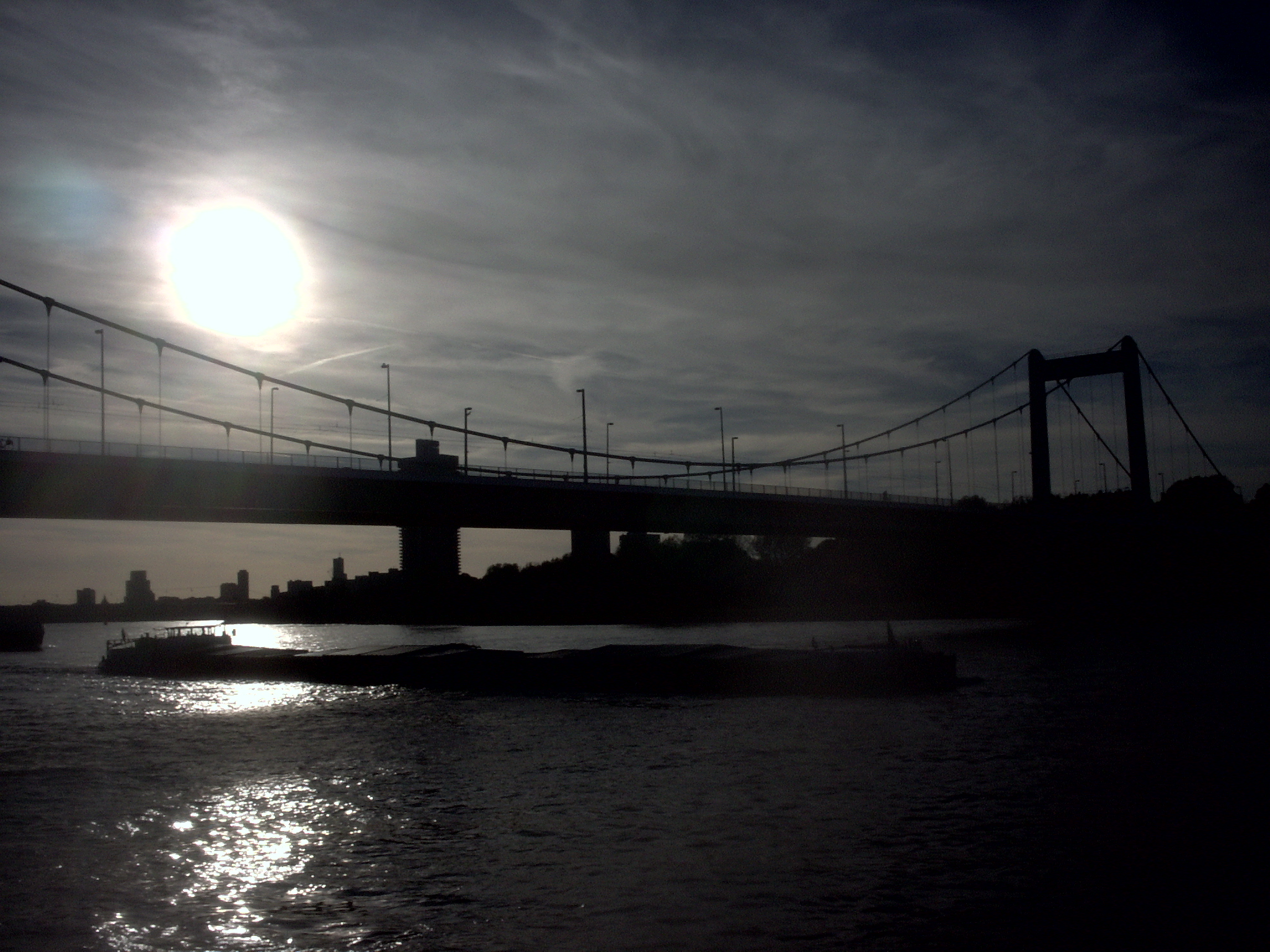 Mülheimer Brücke in Köln